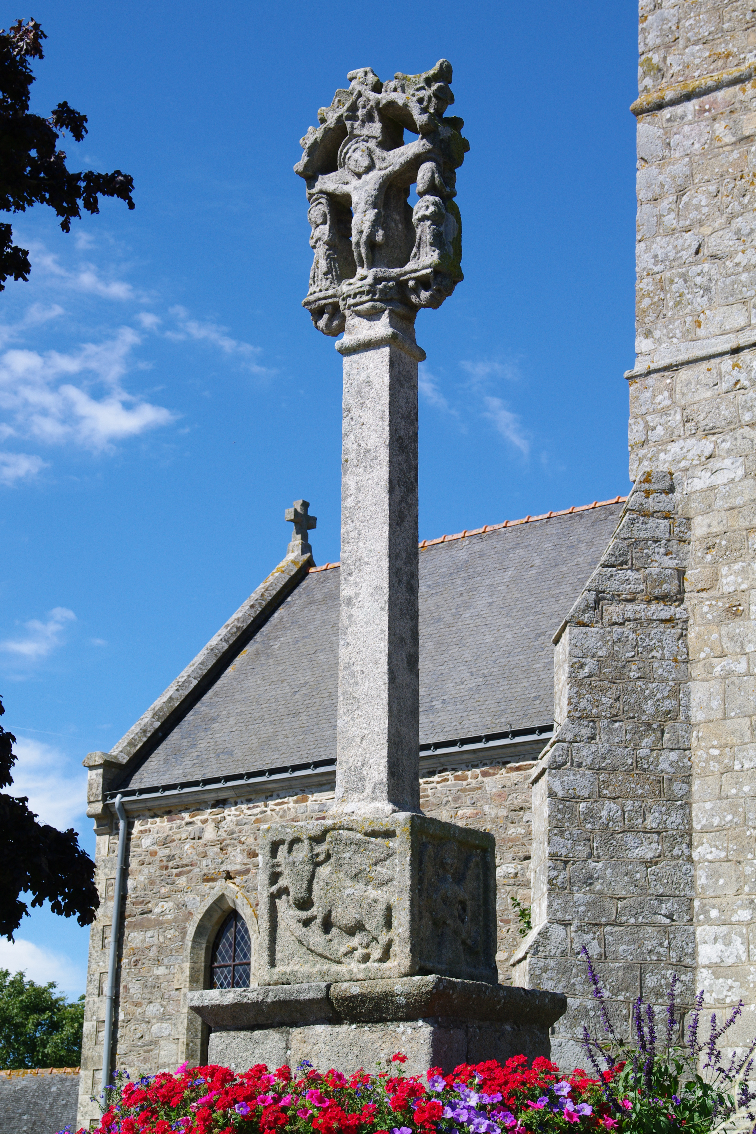 Croix du cimetière, Eglise (rue de l') (Inscription, 1964) .